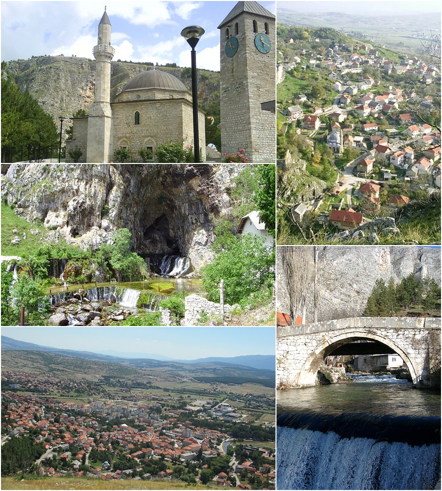 Livno